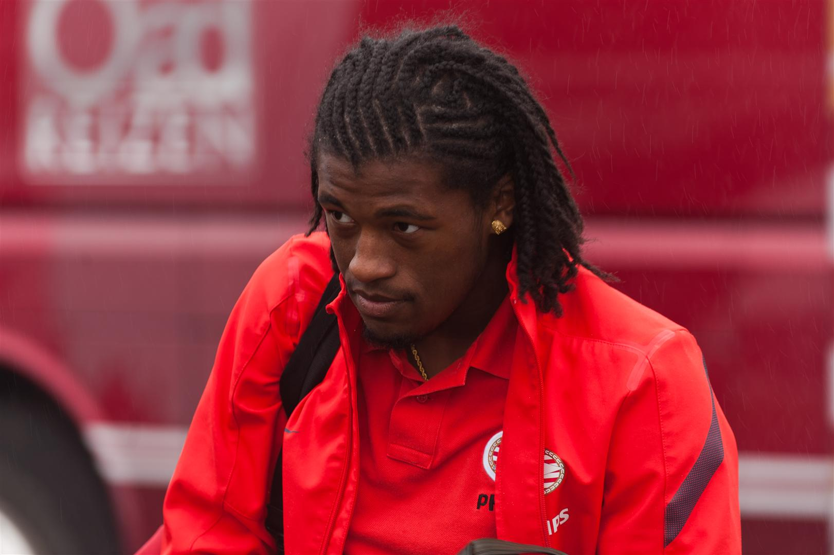 Georginio Wijnaldum